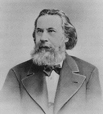 Porträt Robert Schweichel